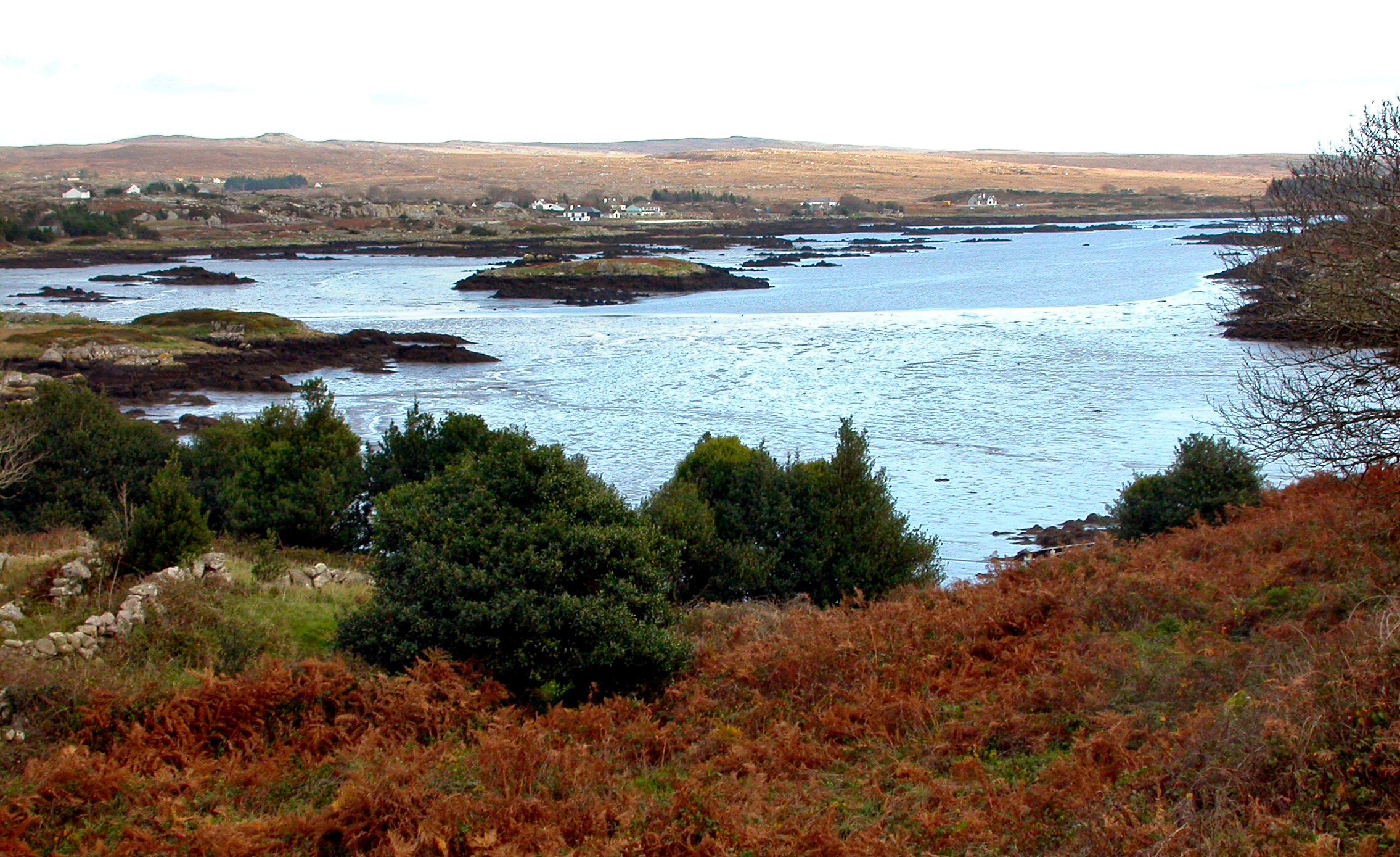 Casla, Co. na Gaillimhe